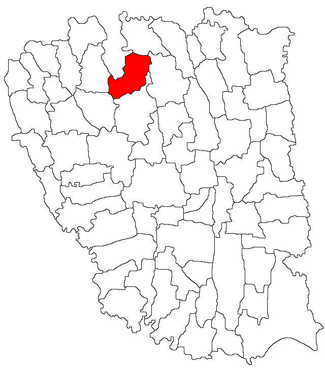 Categorie:Hărţi ale judeţului Galaţi